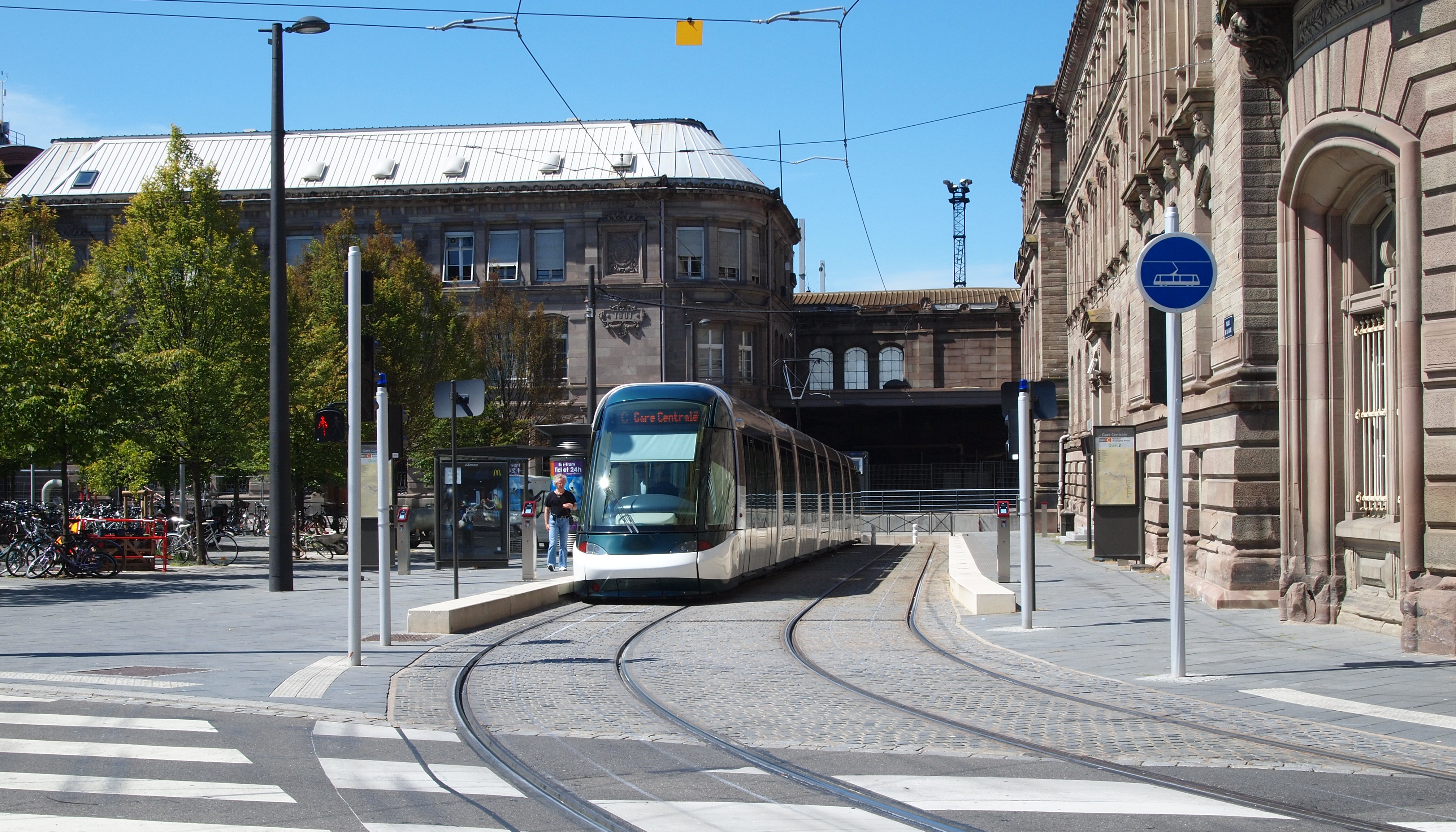 Straßenbahn Straßburg, oberirdische Haltestelle Hauptbahnhof der Linie C